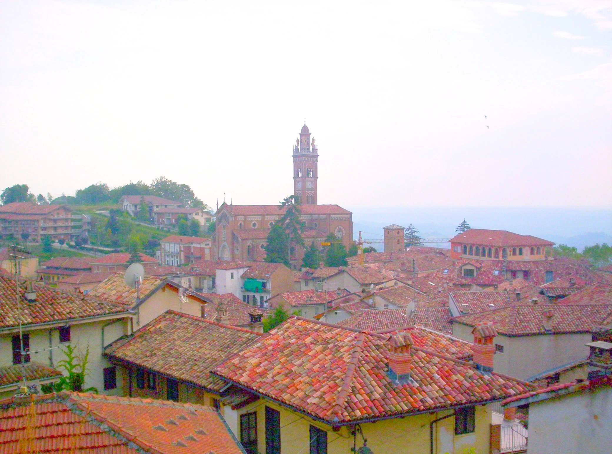 veduta su Monforte d'Alba (Cuneo)